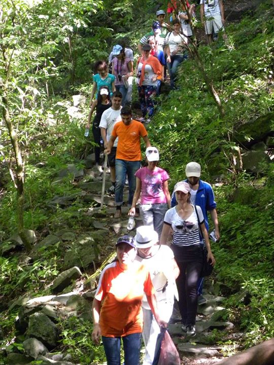 Հայագիտական արշավ Դսեղում, 2014, ՀԳԱԴ